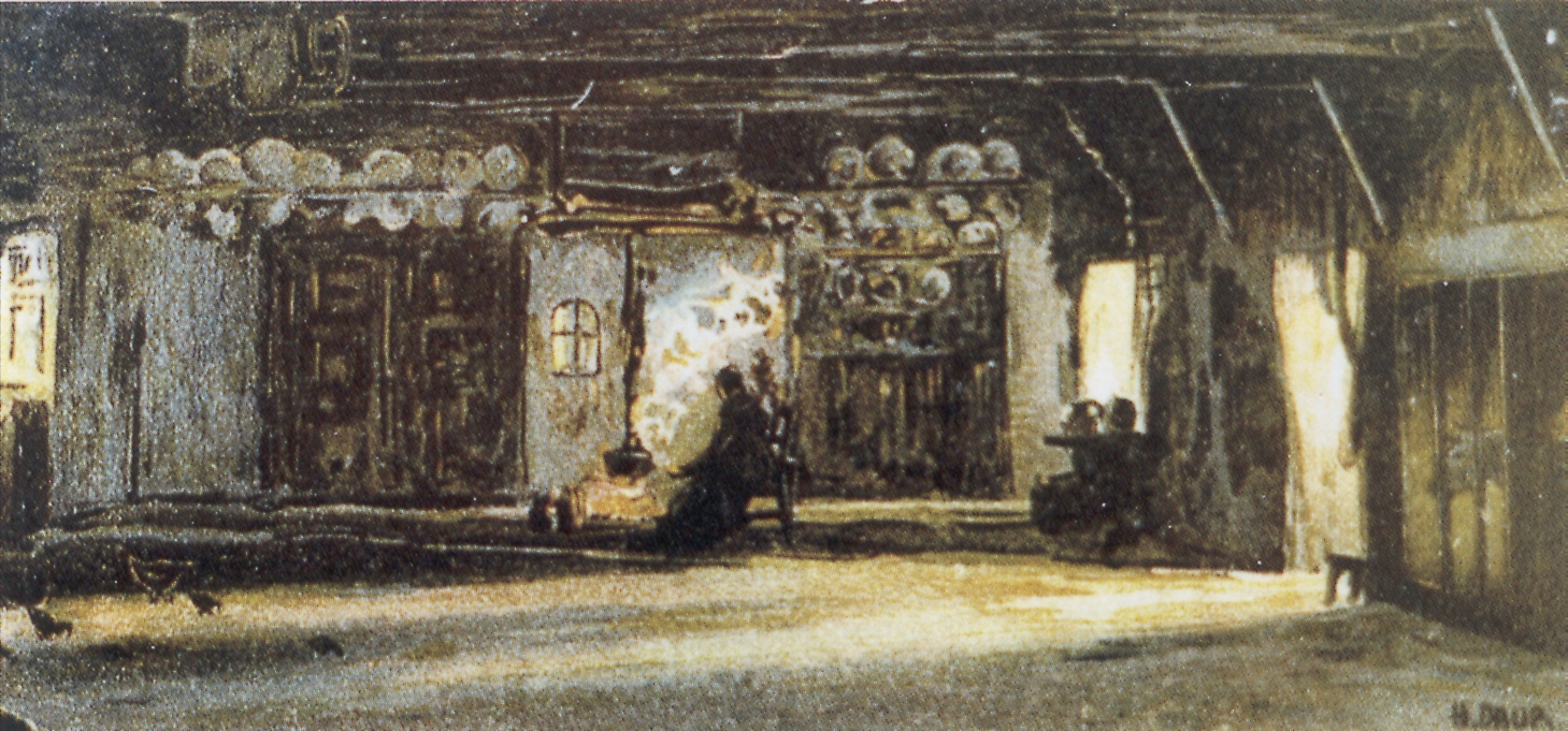 Gemälde von Hermann Daur (1870 - 1925): Frelsdorf - Inneres eines niedersächsischen Bauernhauses, dargestellt ist das Flett mit Feuerstelle des Hofes Tienken in 27616 Frelsdorf, Landkreis Cuxhaven, Niedersachsen, um das Jahr 1900